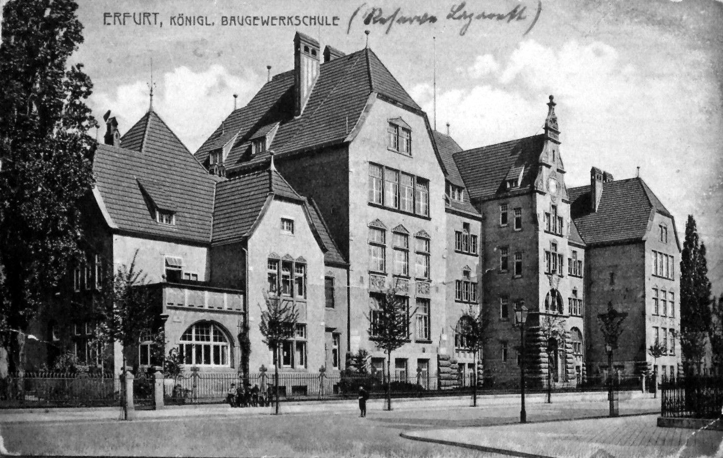 Erfurt, Köngliche Baugewerkschule